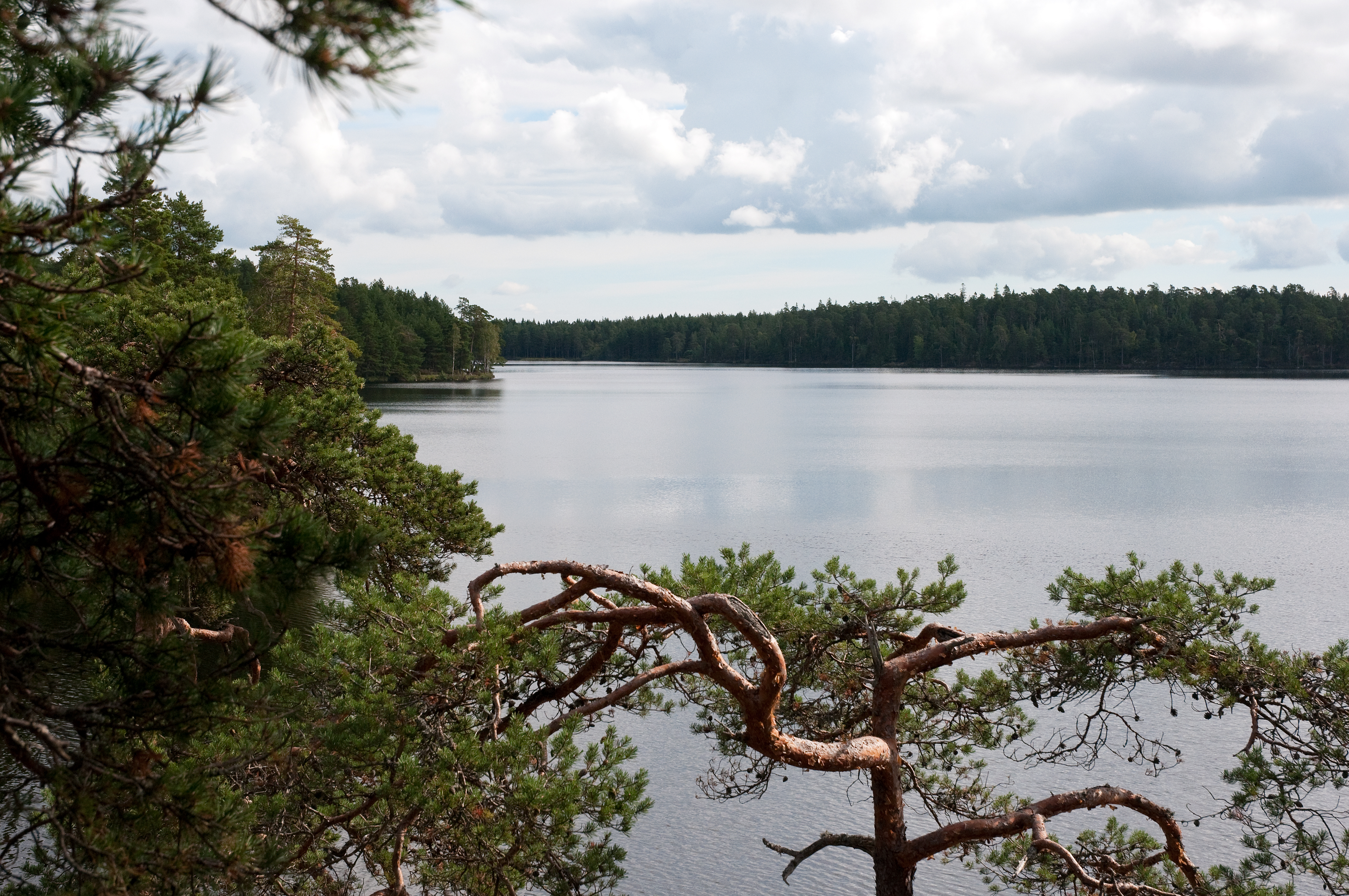 Nävsjön, från utsiktsberget, i Nyköpings kommun